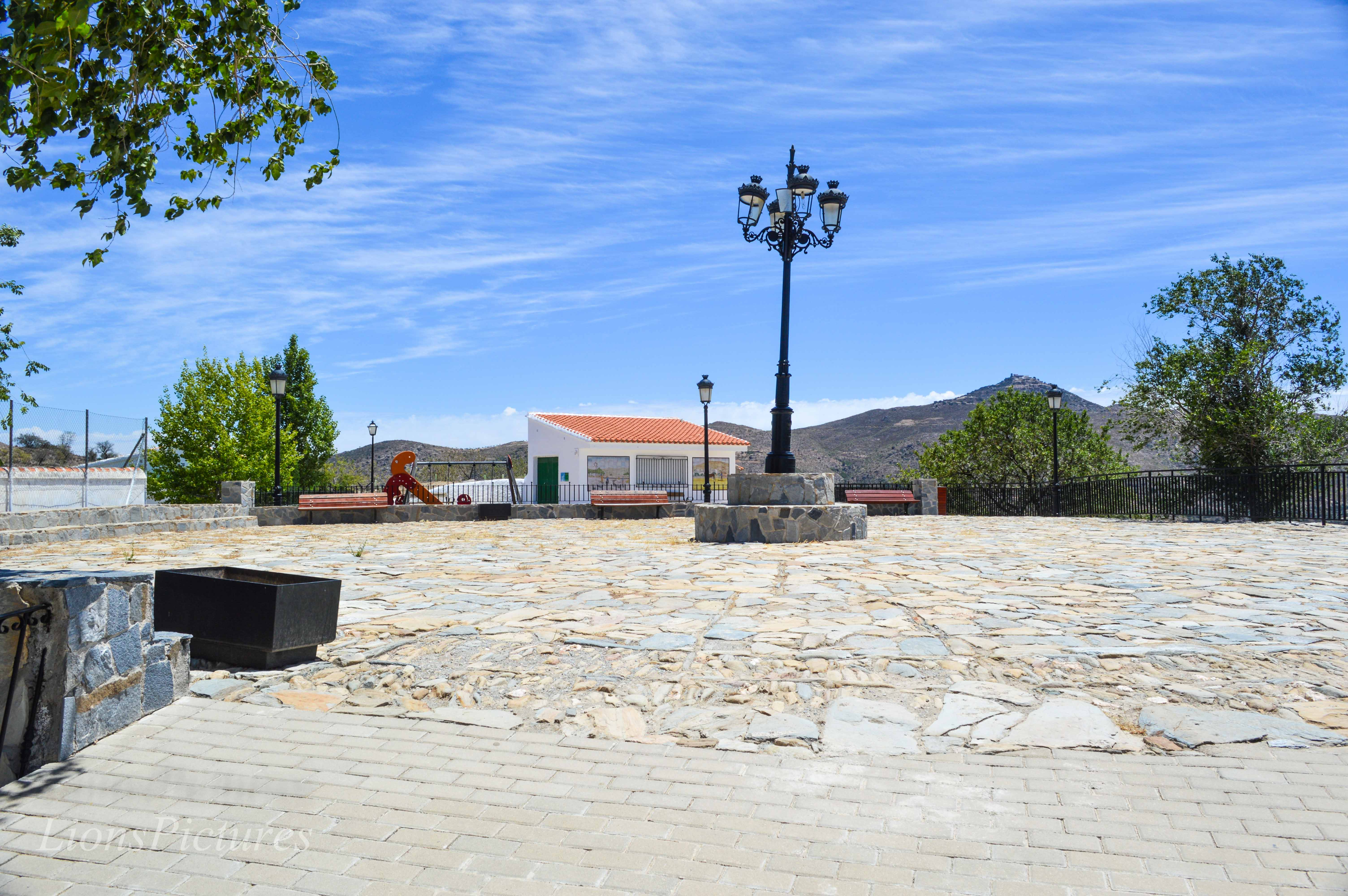 Mirador de la Era 1